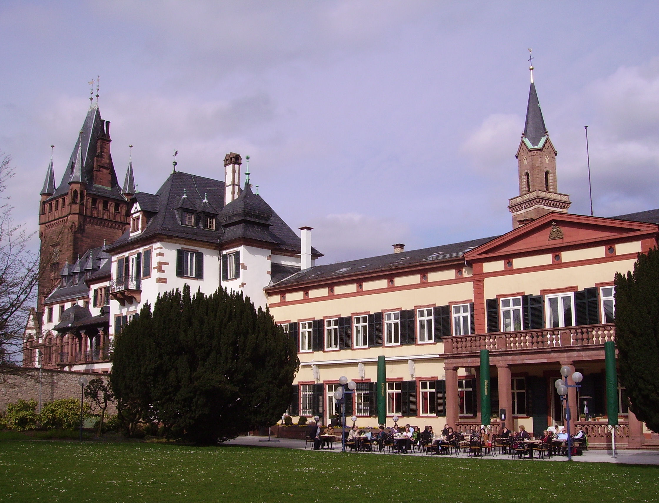 view of Weinheim, Germany, Berckheimer Schloss, Teilbereich (Südflügel) im Vordergrund ist das ehemalige Ulmersche Schloss (1725, 1780 umgebaut), heute Restaurant und Rathausteilbereich, im Hintergrund Turm der Laurentiuskirche (1850); links 39m hoher neugotischer Schlossturm (1868)